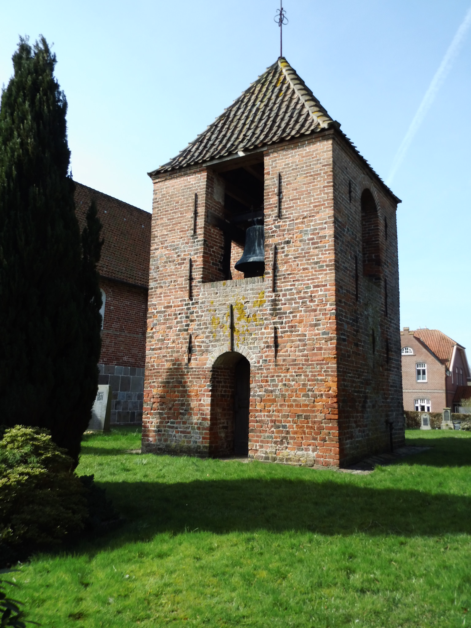 Freistehender Glockenturm der Ardorfer Kirche, Ardorf, Stadtteil der Stadt Wittmund, Landkreis Wittmund, Niedersachsen, Deutschland]